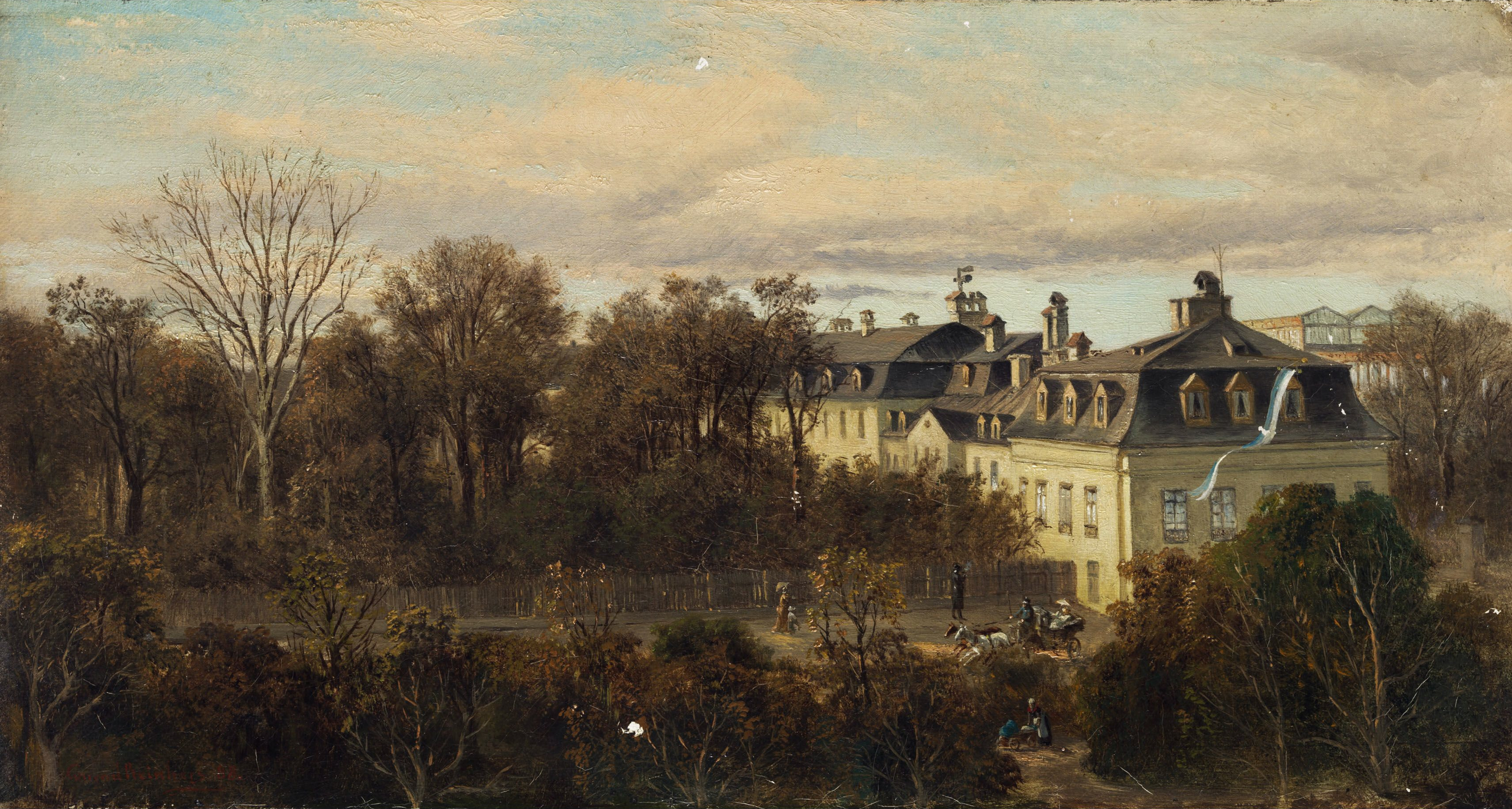 Blick auf eine städtische Häusergruppe im Park mit einer großen Orangerie; Öl auf Leinwand; 21 x 39 cm, signiert und datiert „1888“, rechts bayerische (?) Fahne, Darstellung möglicherweise im Zusammenhang mit dem Münchener Botanischen Garten